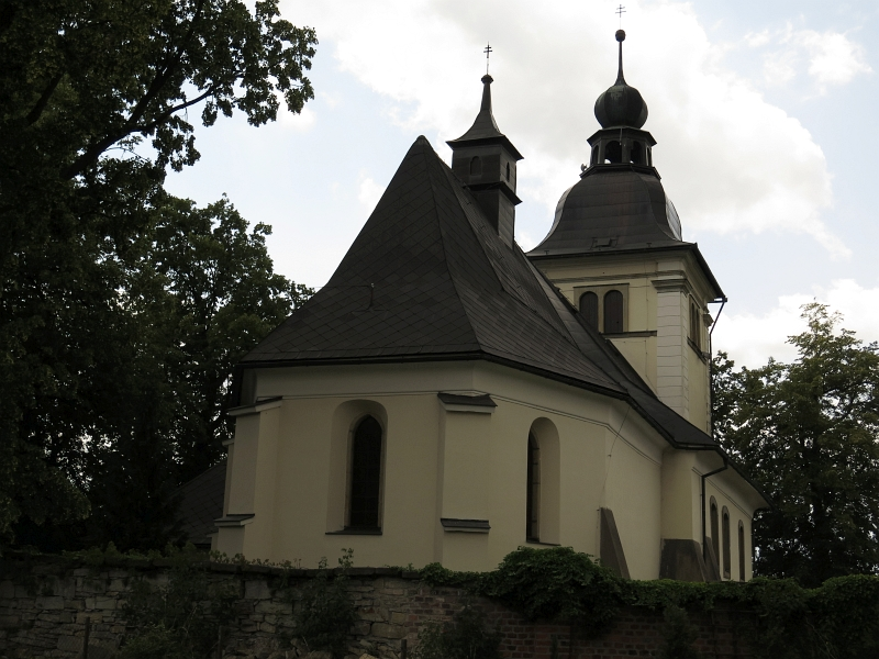 Kostel svatých Filipa a Jakuba, Lukavice (okres Ústí nad Orlicí).